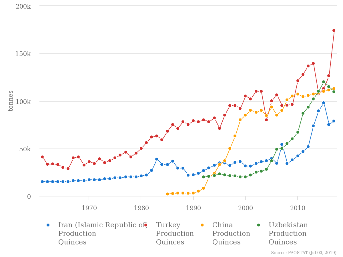 به